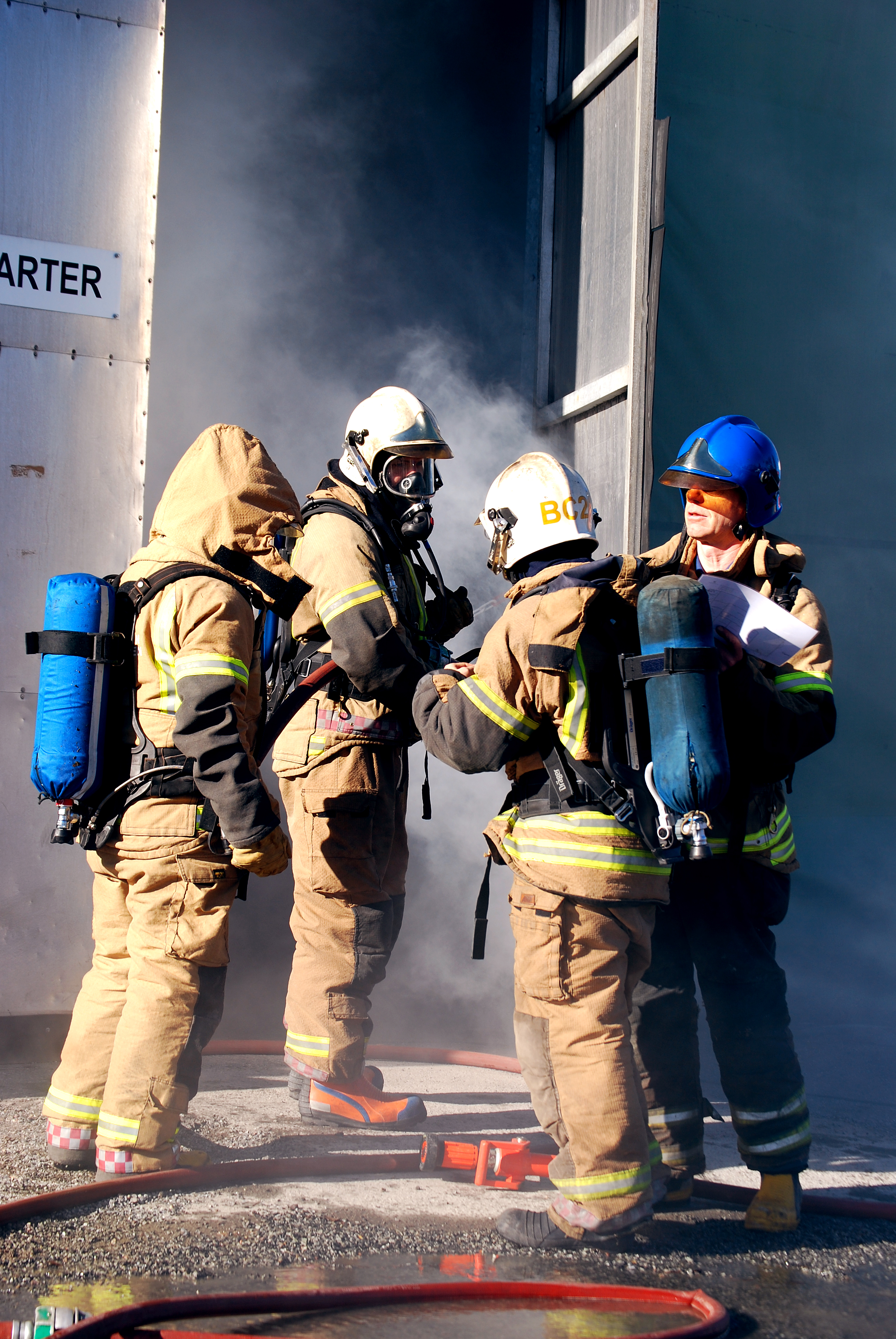 Brannmenn fra Bamble brannvesen (Telemark) under en øvelse.